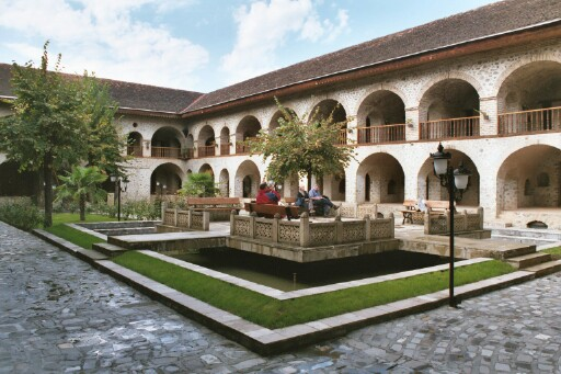 Caravanserai Hotel in Shaki, Azerbaijan